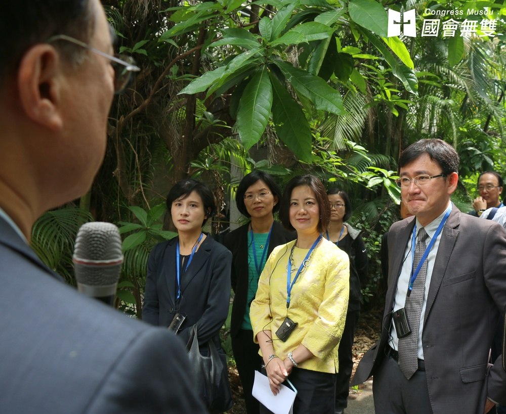 中文（台灣）: 臺北機廠考察行程立委參與踴躍，隨行助理笑稱，「都可以現場開委員會了」。右起為民進黨立委黃國書、吳思瑤、蘇巧慧、鄭麗君。